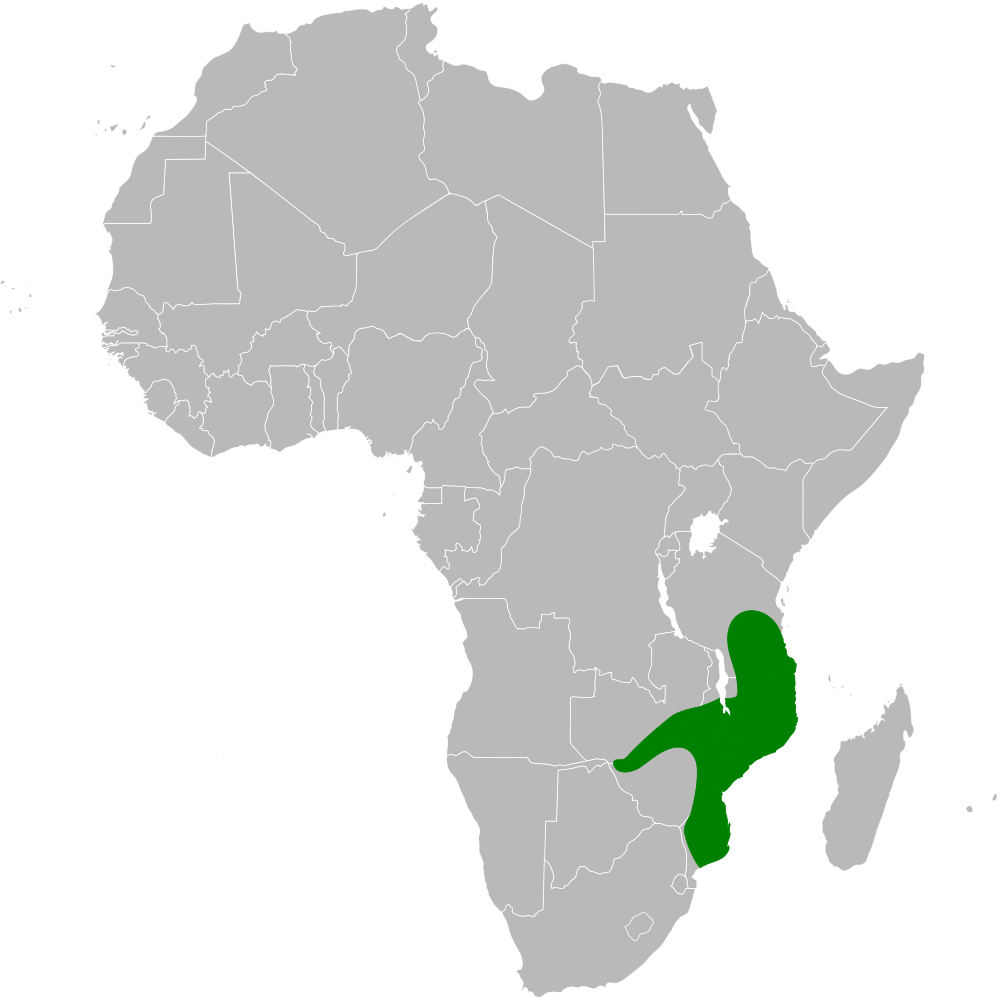 Erythrocercus livingstonei distribution map, based on